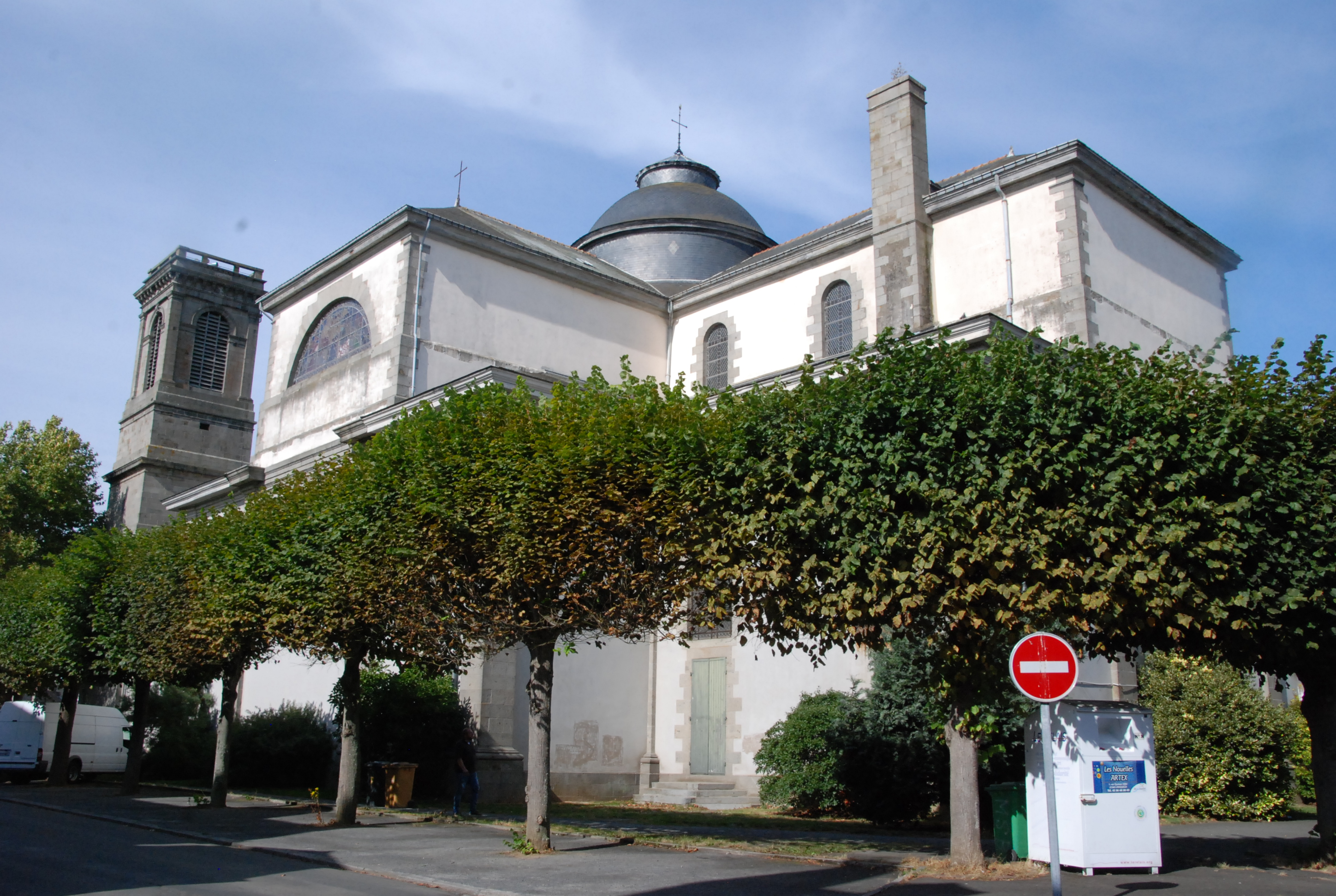 Eglise Saint-Michel (Saint-Brieuc, 22)